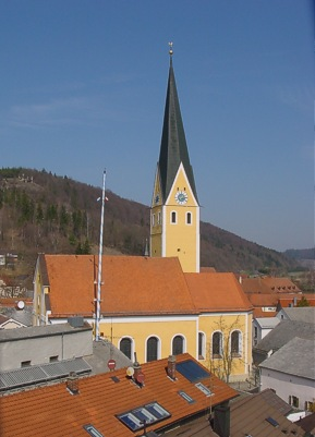 Stadtpfarrkirche St. Ägidius in Dietfurt a. d. Altmühl